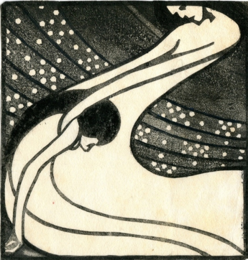 Mileva Roller Zwei Frauen (ohne bekanntem Titel)